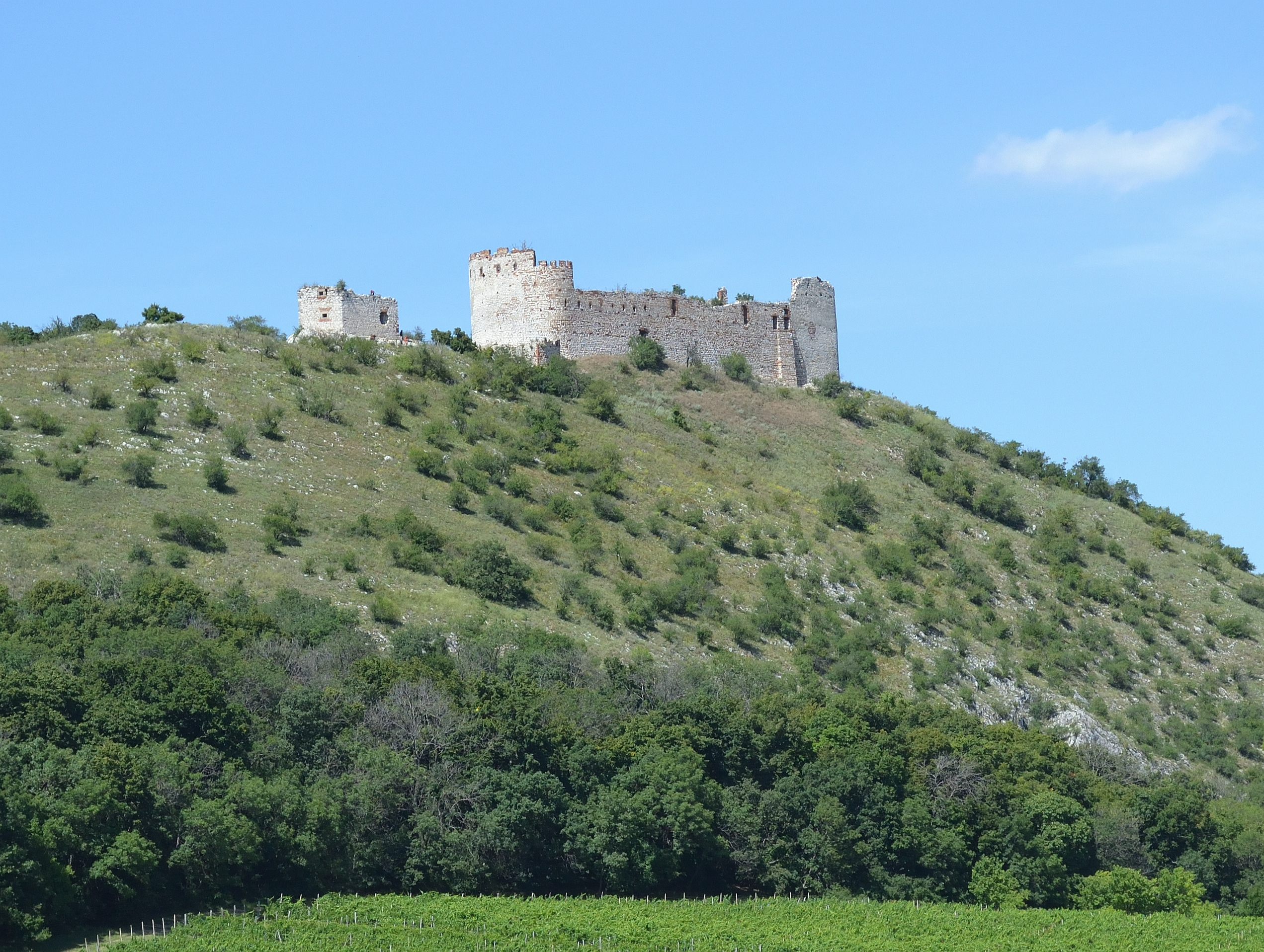 Pavlov (okres Břeclav) - zřícenina Děvičky, pohled od V